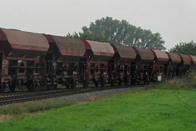 Kohlezug der Rurtalbahn mit Braunkohle für die Zuckerfabrik Jülich verlässt den Bahnhof Krauthausen auf der Strecke Düren - Jülich.